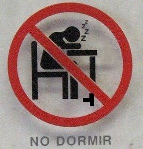 Escuela